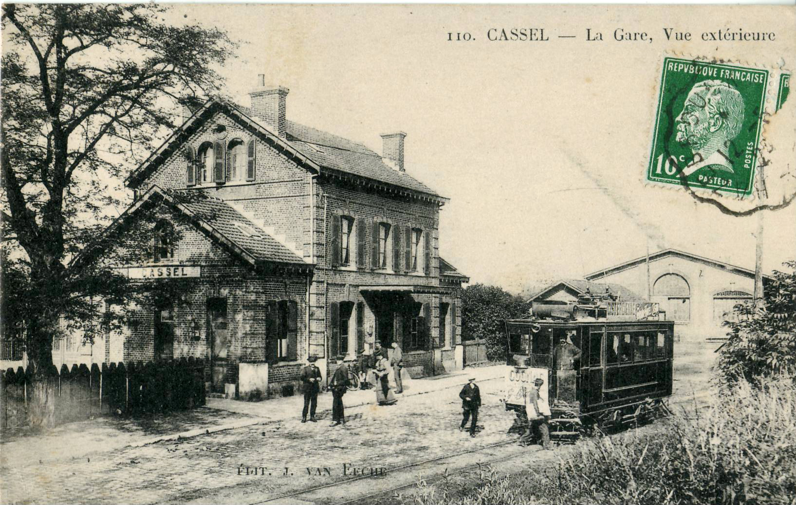 Carte postale ancienne éditée par J. Van Eeche, n°110 : CASSEL - La Gare, vue extérieure